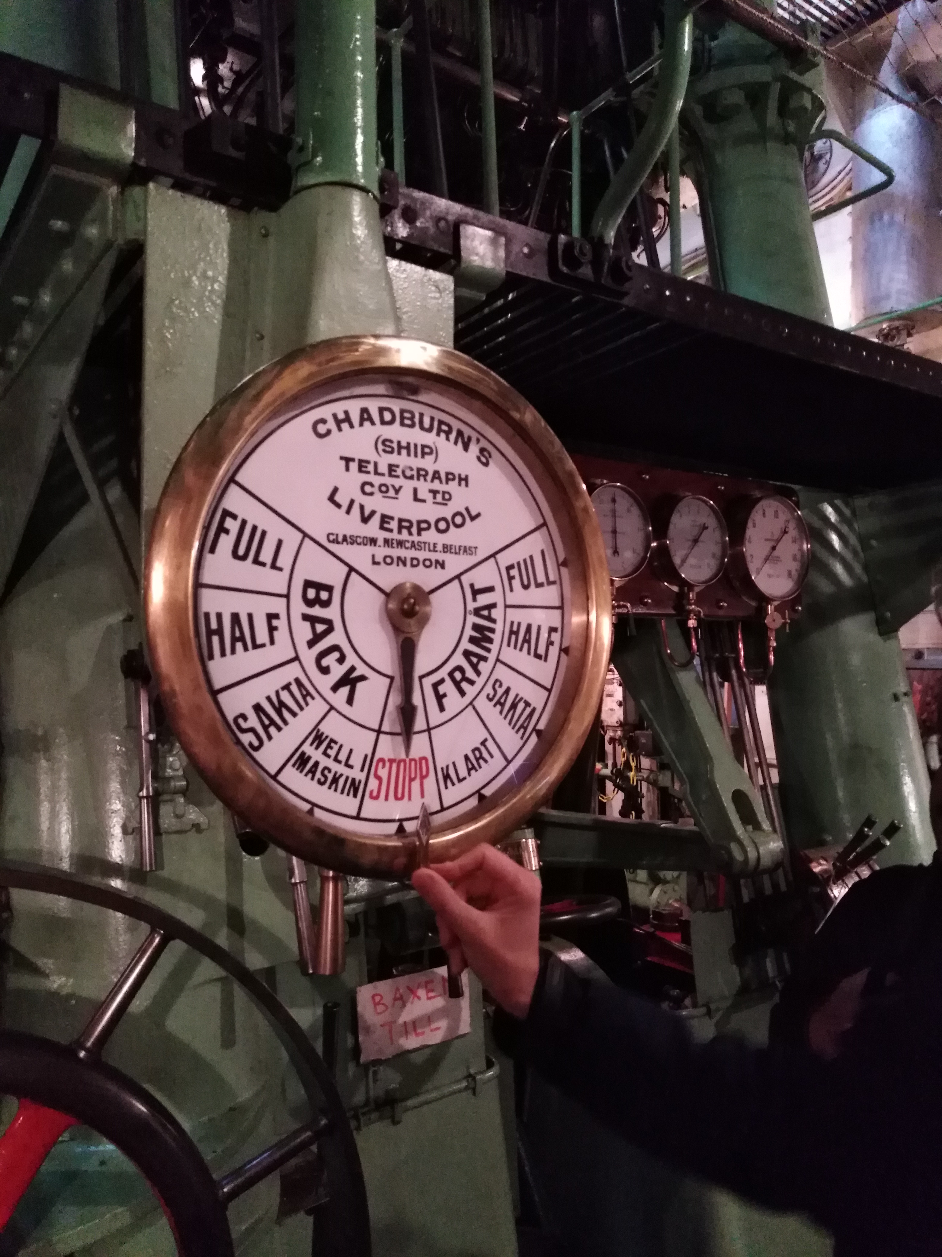 sala motore posteriore: display comandi